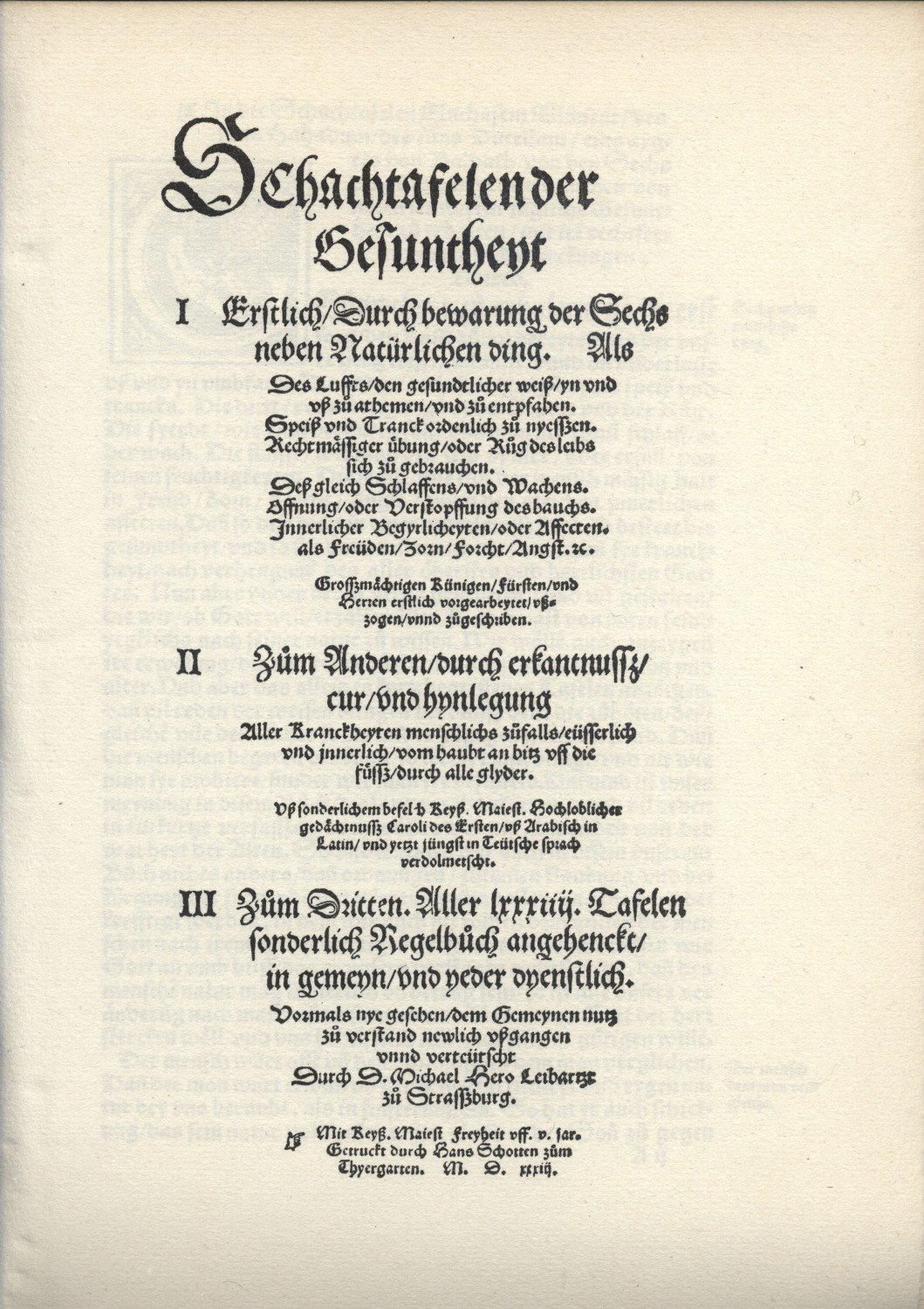 Schachtafelen der Gesuntheyt Nachdruck 1988 title